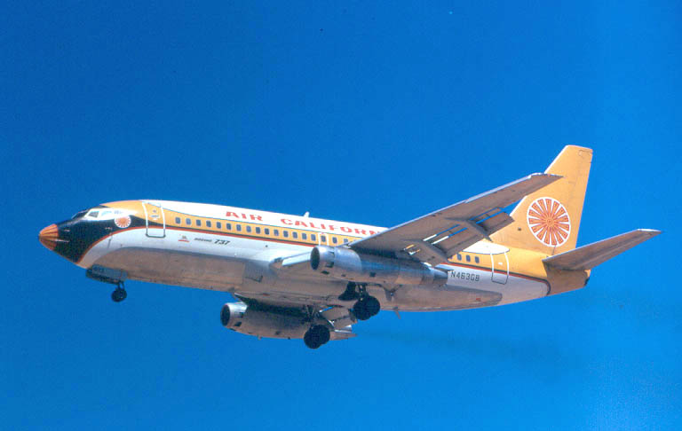 AirCal737lndg